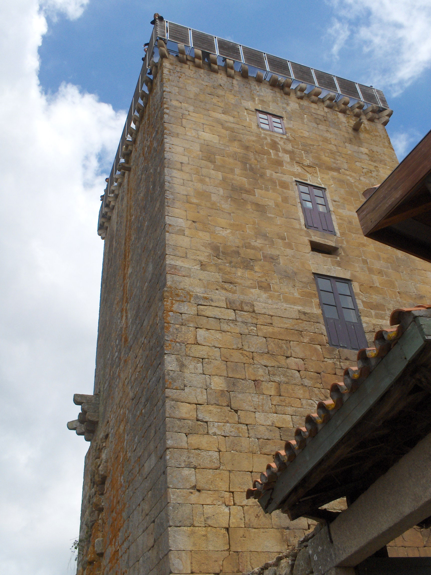 17 de mayo de 2008, Vilanova dos Infantes, Celanova, Ourense, Galicia. Romaría Etnográfica Raigame